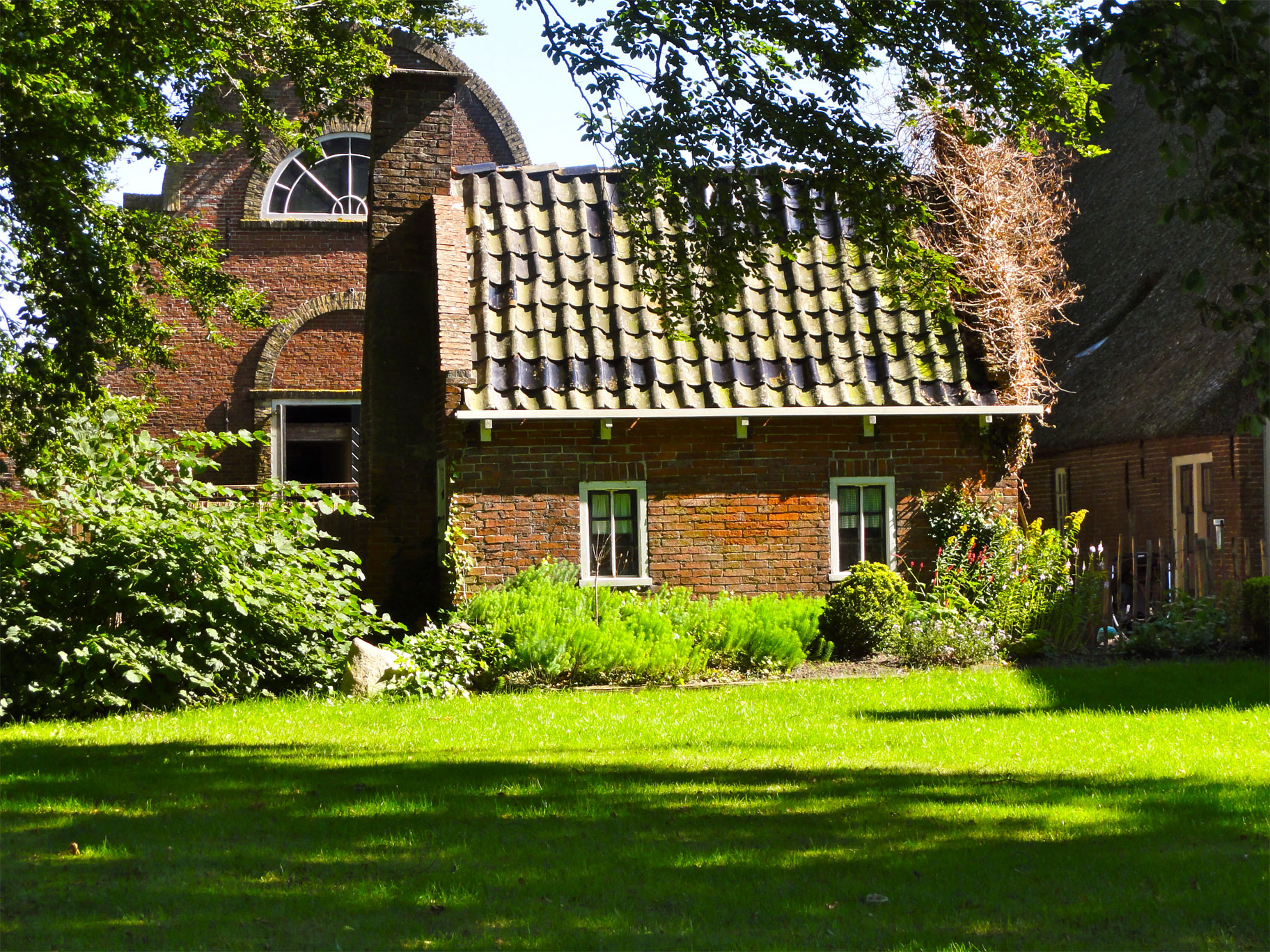 Boerderij met stookhok en schuur aan de Boerestreek 6 It_Heechsan